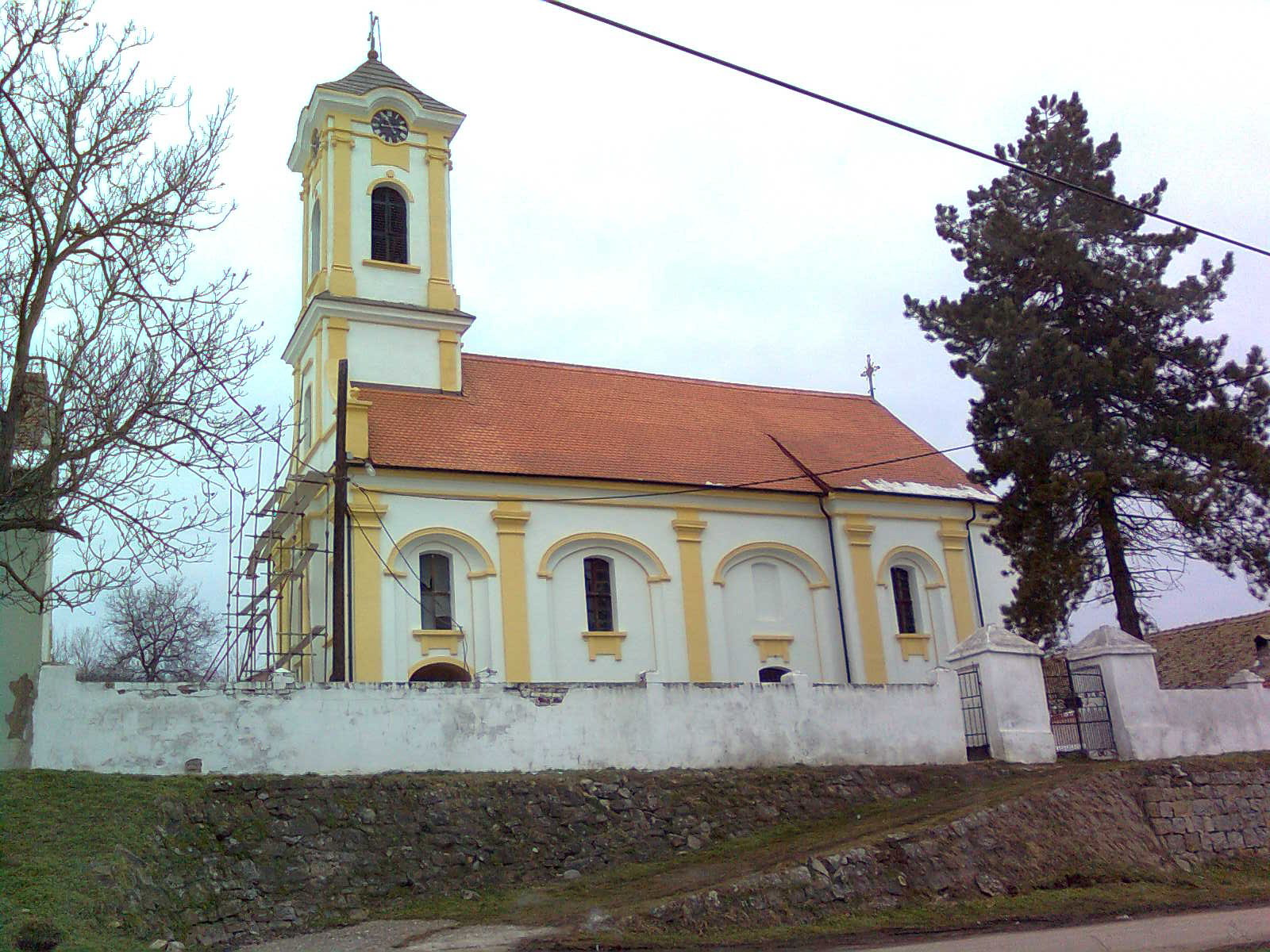 crkva u Čortanovcima